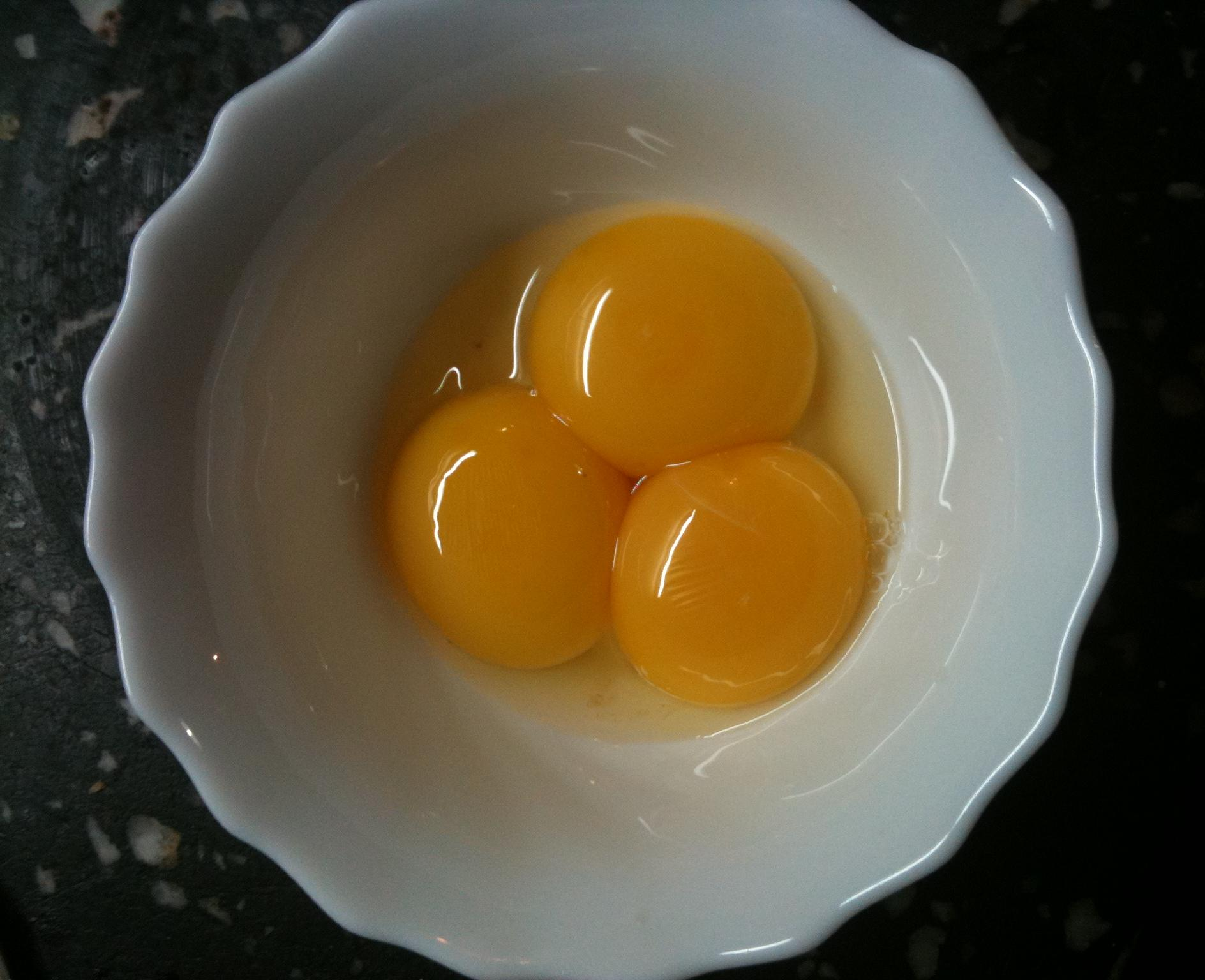 Tres yemas de huevo de gallina en un recipiente blanco.